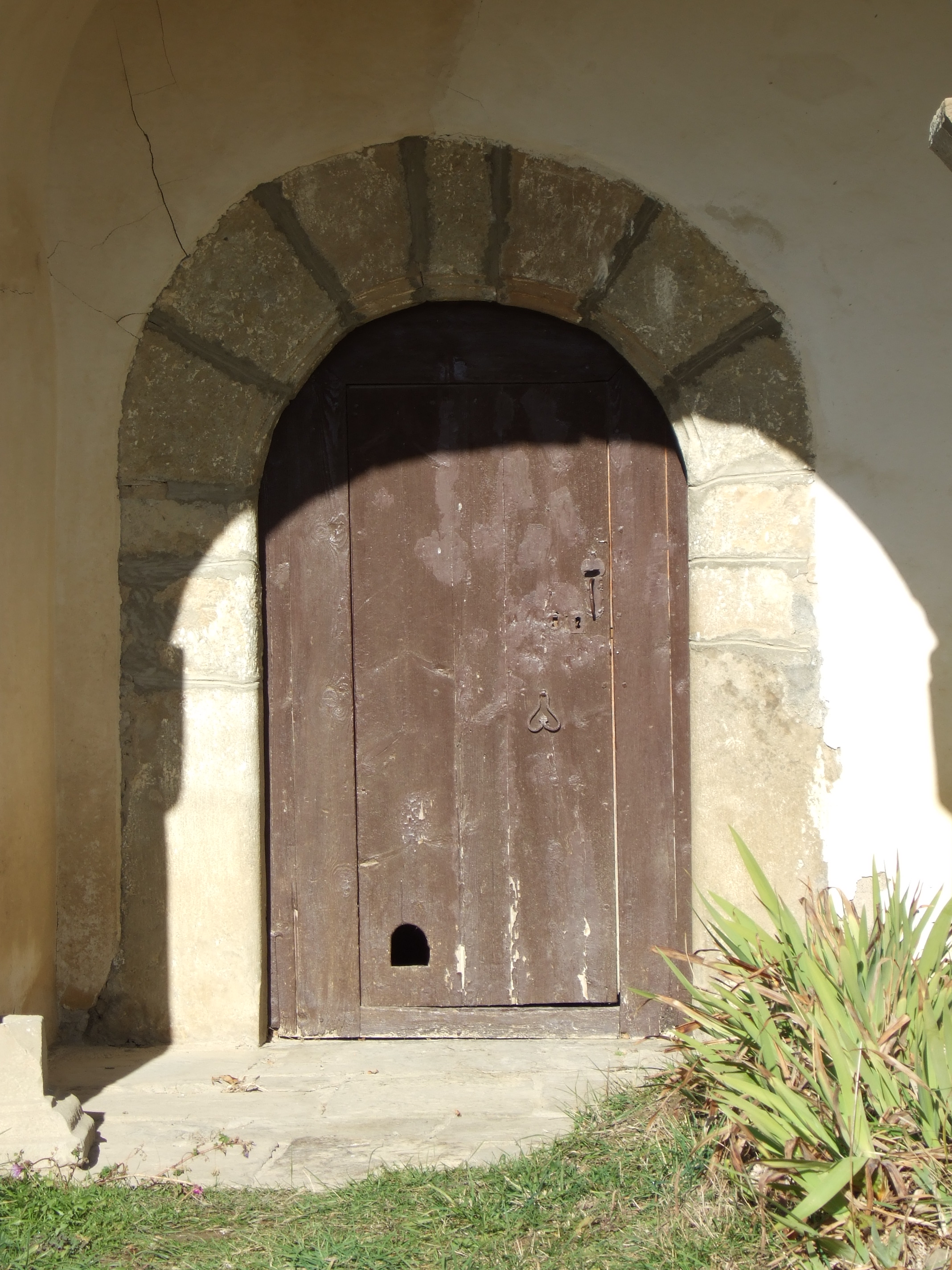 Latas - Iglesia de San Martín - Puerta